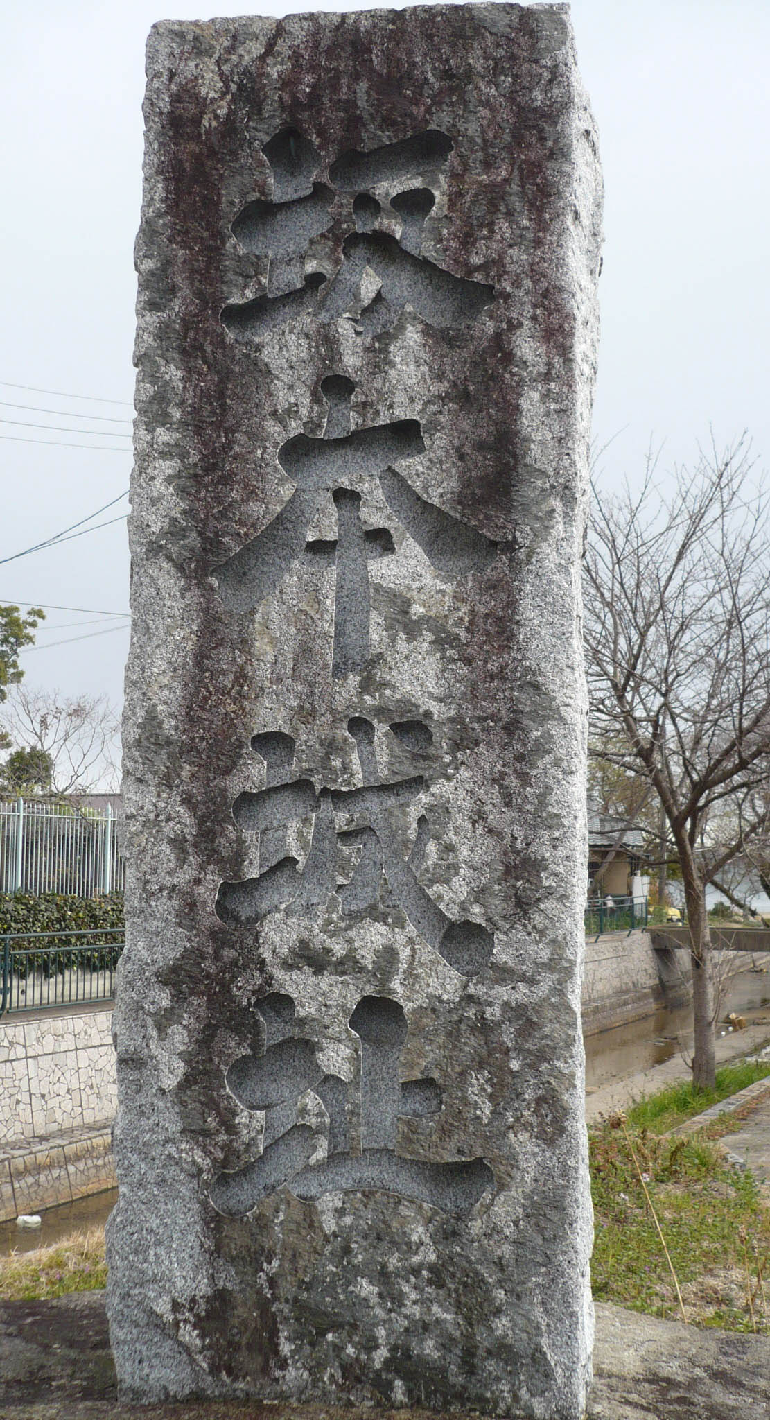 坂本城の石碑